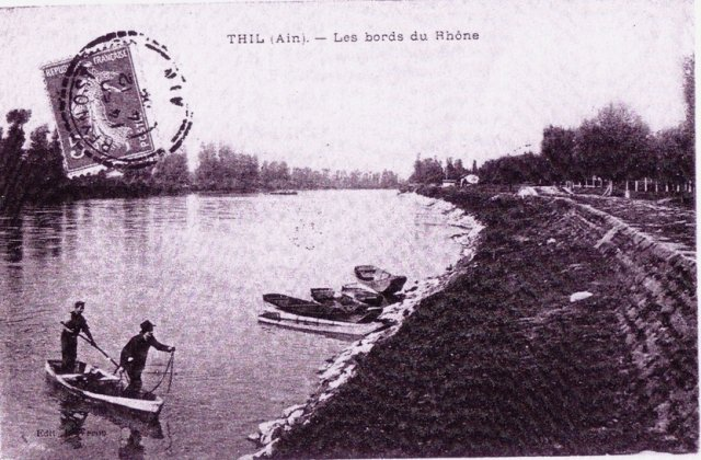 Bord du Rhône à Thil en 1900.